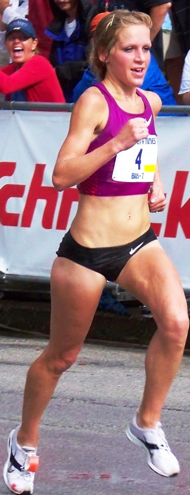 Lisa Koll